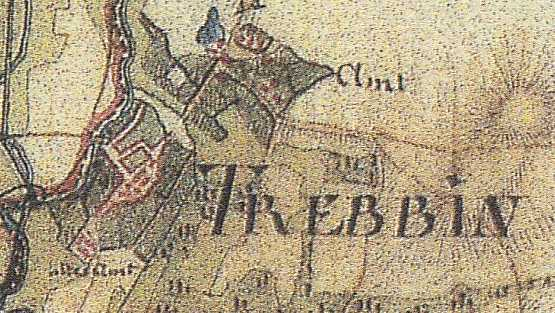 Karte der Stadt Trebbin, Brandenburg, Deutschland, Land Brandenburg, Deutschland, Ausschnitt aus der Schmettau'sche Karte aus den Jahren 1767 bis 1787